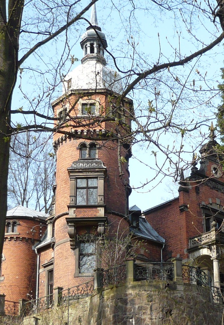 Nowa Ruda, ul. Piłsudskiego 20 - willa „Konrad”, 1890 (zabytek nr A/936/972/WŁ z 8.12.1983)